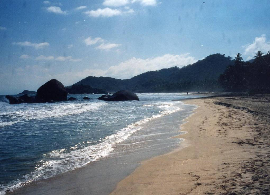 Strand im Nationalpark Tayrona, (Arecifes)